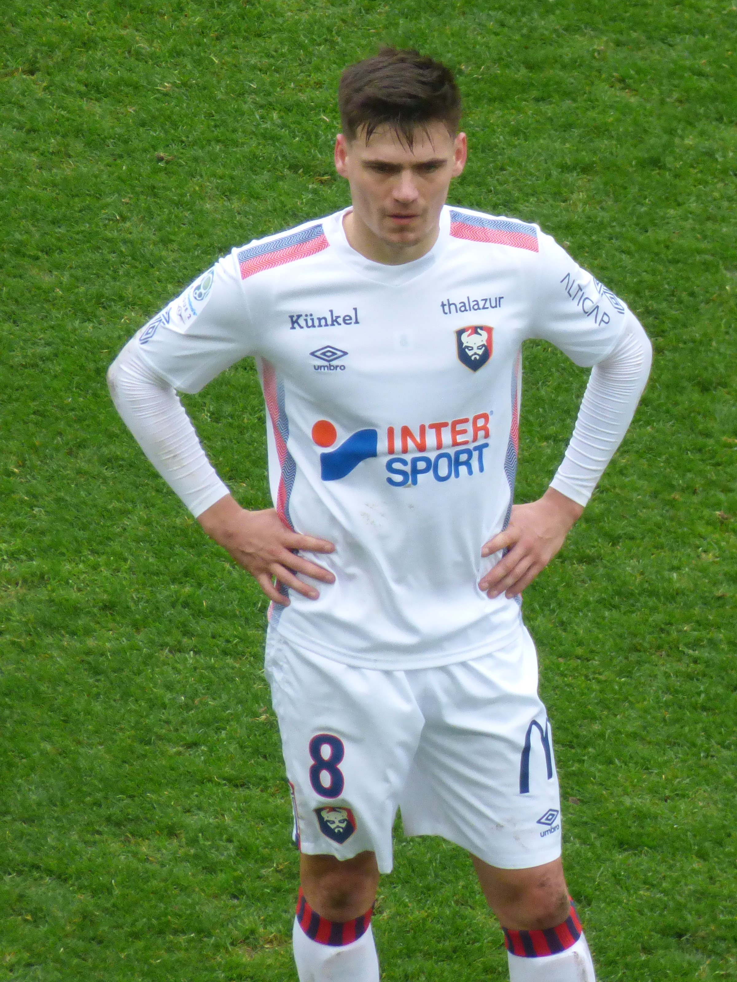 Jessy Deminguet lors du match RC Lens / SM Caen, comptant pour la vingt-sixième journée du championnat de France de football de Ligue 2 2019/2020, le 22 février 2020, au Stade Bollaert-Delelis